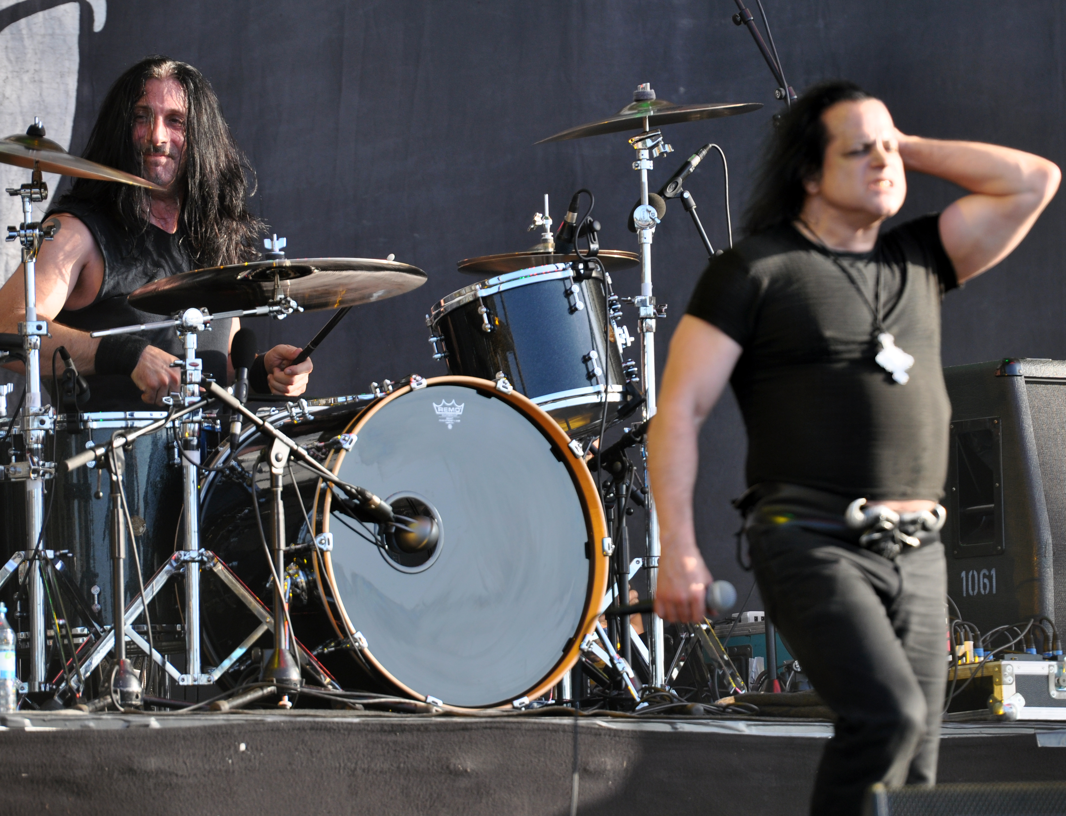 Danzig at Wacken Open Air 2013